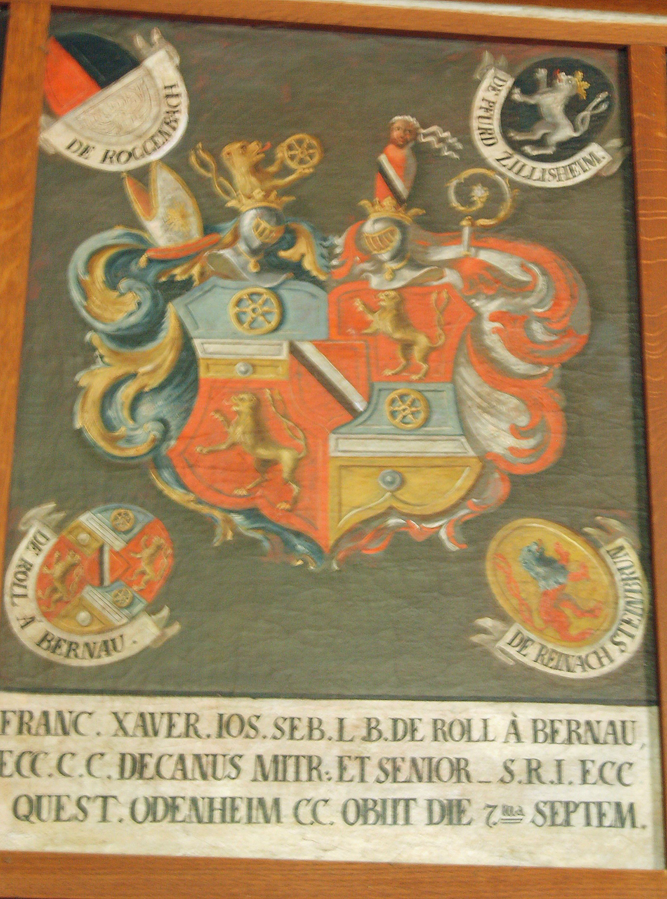 Konstanzer Münster Wappen im Kreuzgang Roll zu Bernau